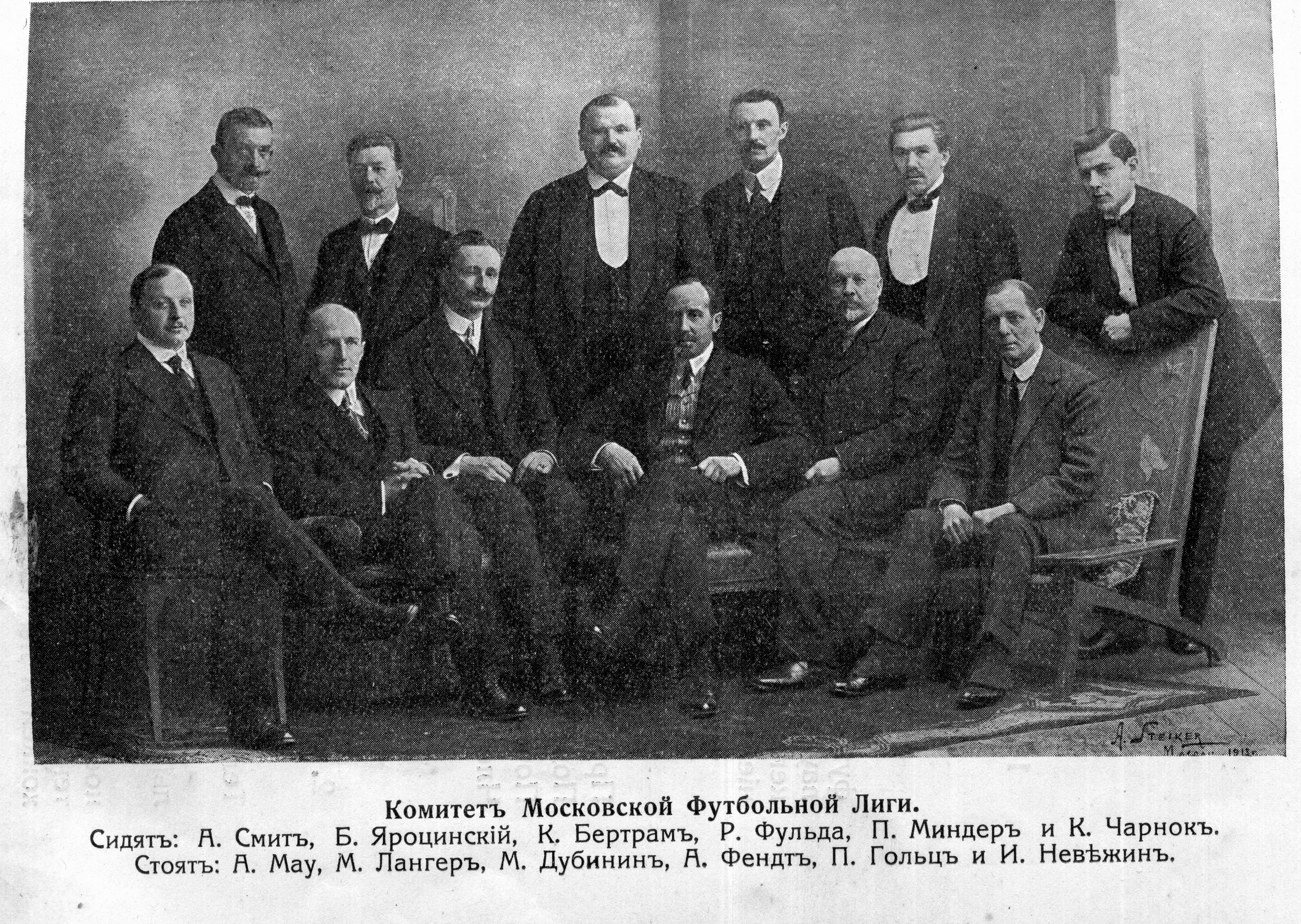 Комитет Московской футбольной лиги Сидят: А. Смит, Б. Яроцинский, К. Бертрам, Р. Фульда, П. Миндер и К. Чарнок Стоят: А. Мау, М. Лангер, М. Дубинин, А. Фендт, П. Гольц и И. Невежин.